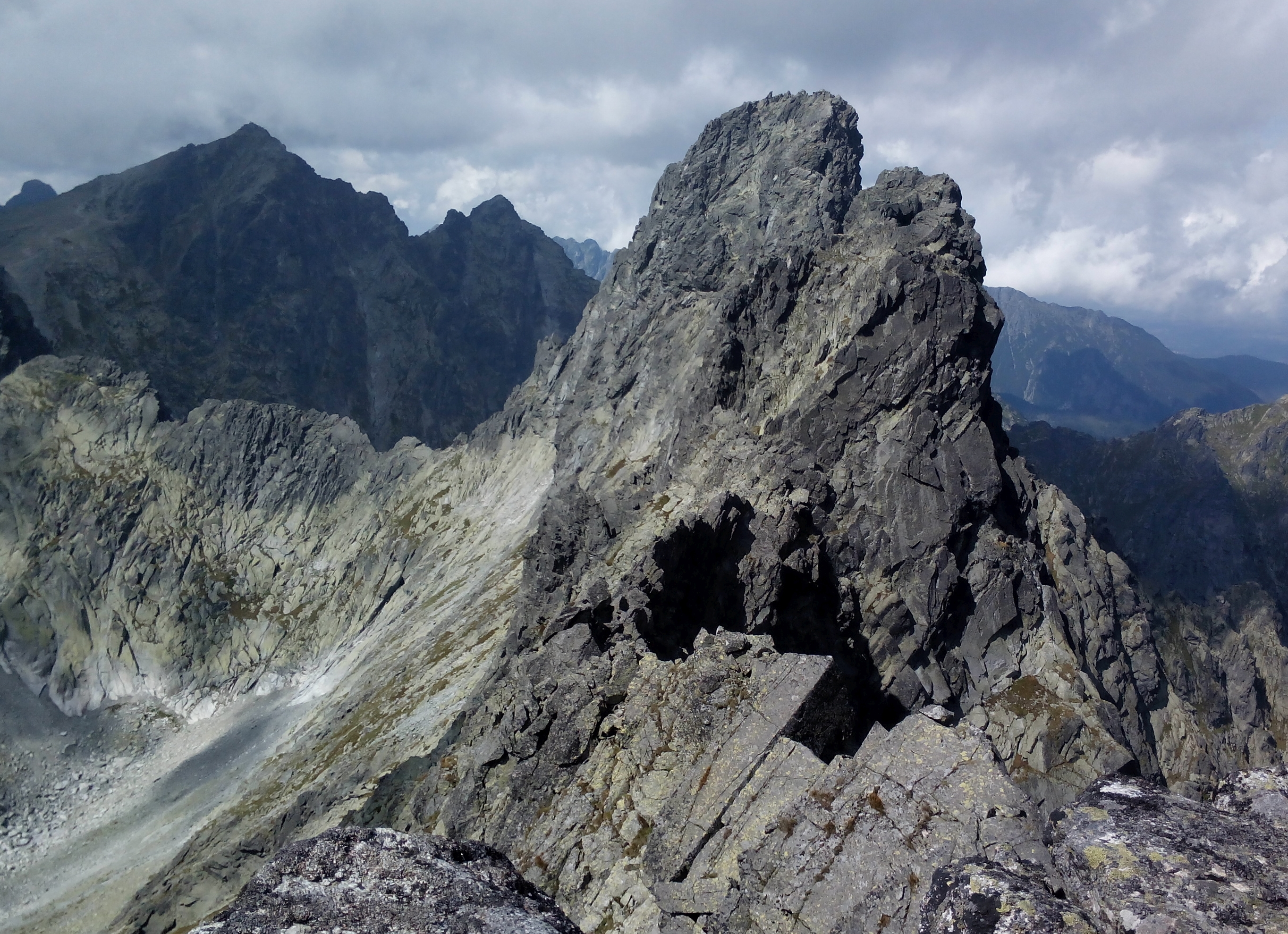 Ganek. Widok ze Żłobistego Szczytu